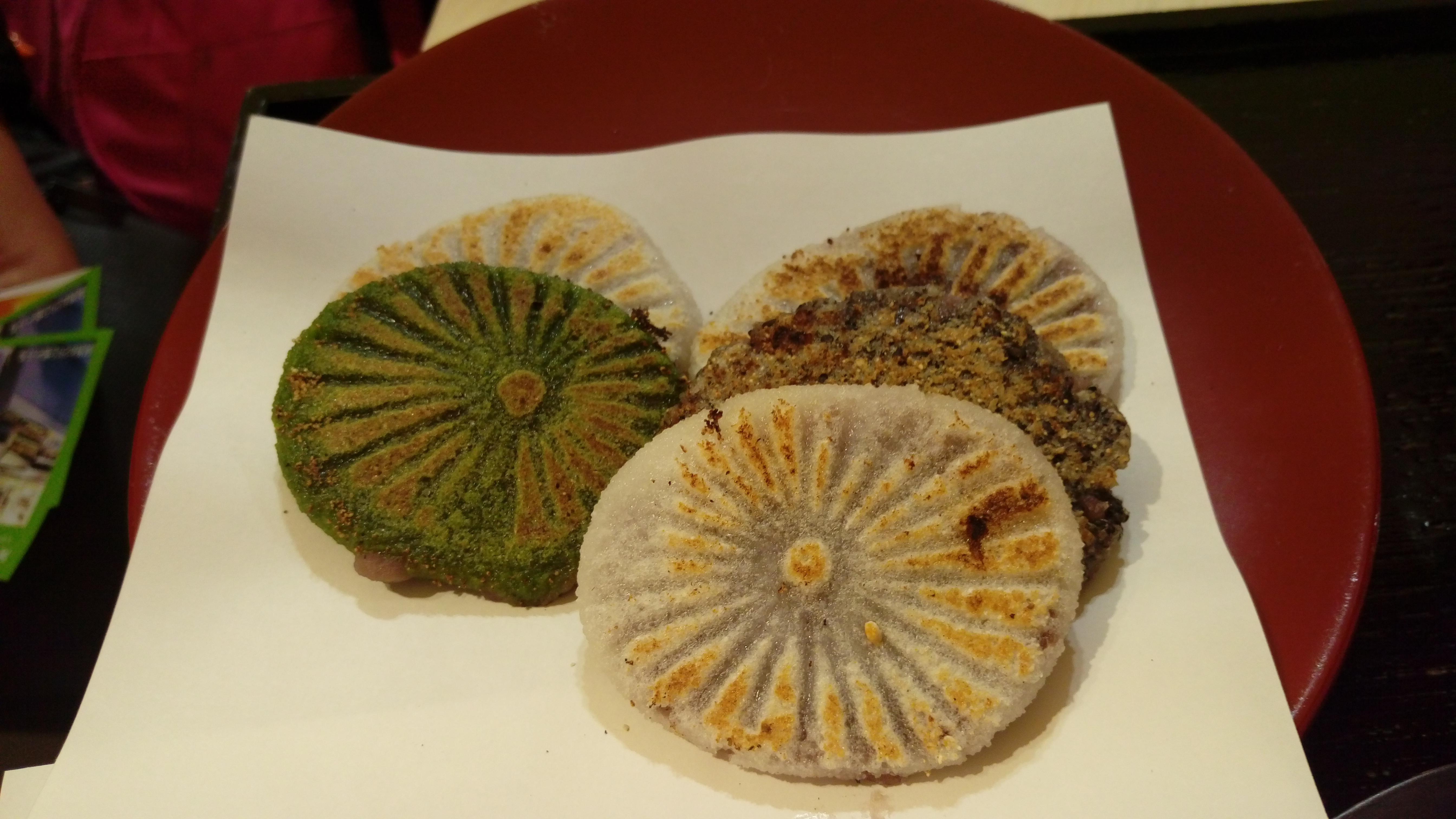 中文（台灣）: 日本德島縣德島市的特色日式點心－瀧之燒餅